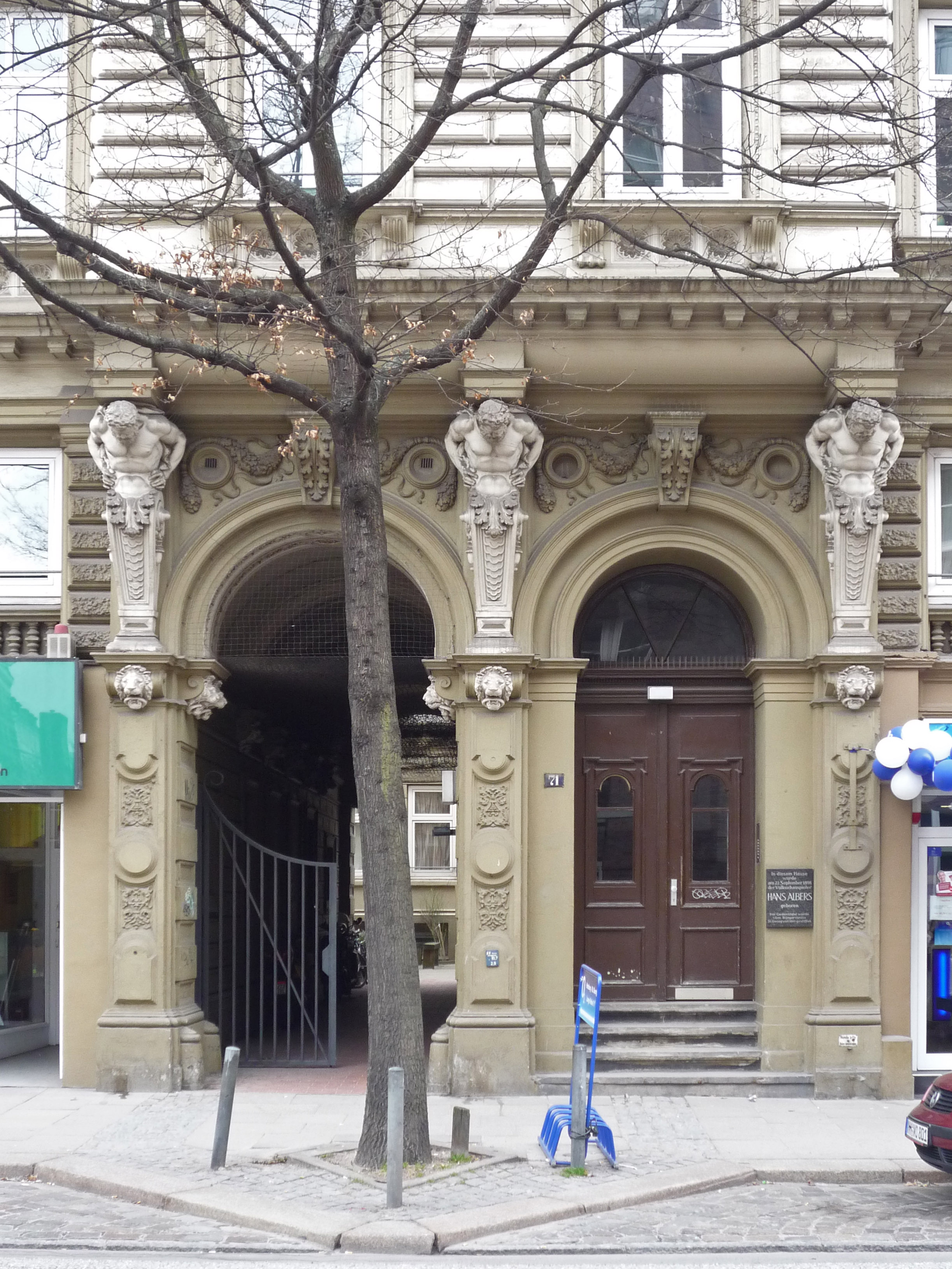 Hamburg, St. Georg, Lange Reihe 71, Geburtshaus des Volksschauspielers und Sängers Hans-Albers. Rechts an der Tür ist die Gedenktafel. This is a photograph of an architectural monument.